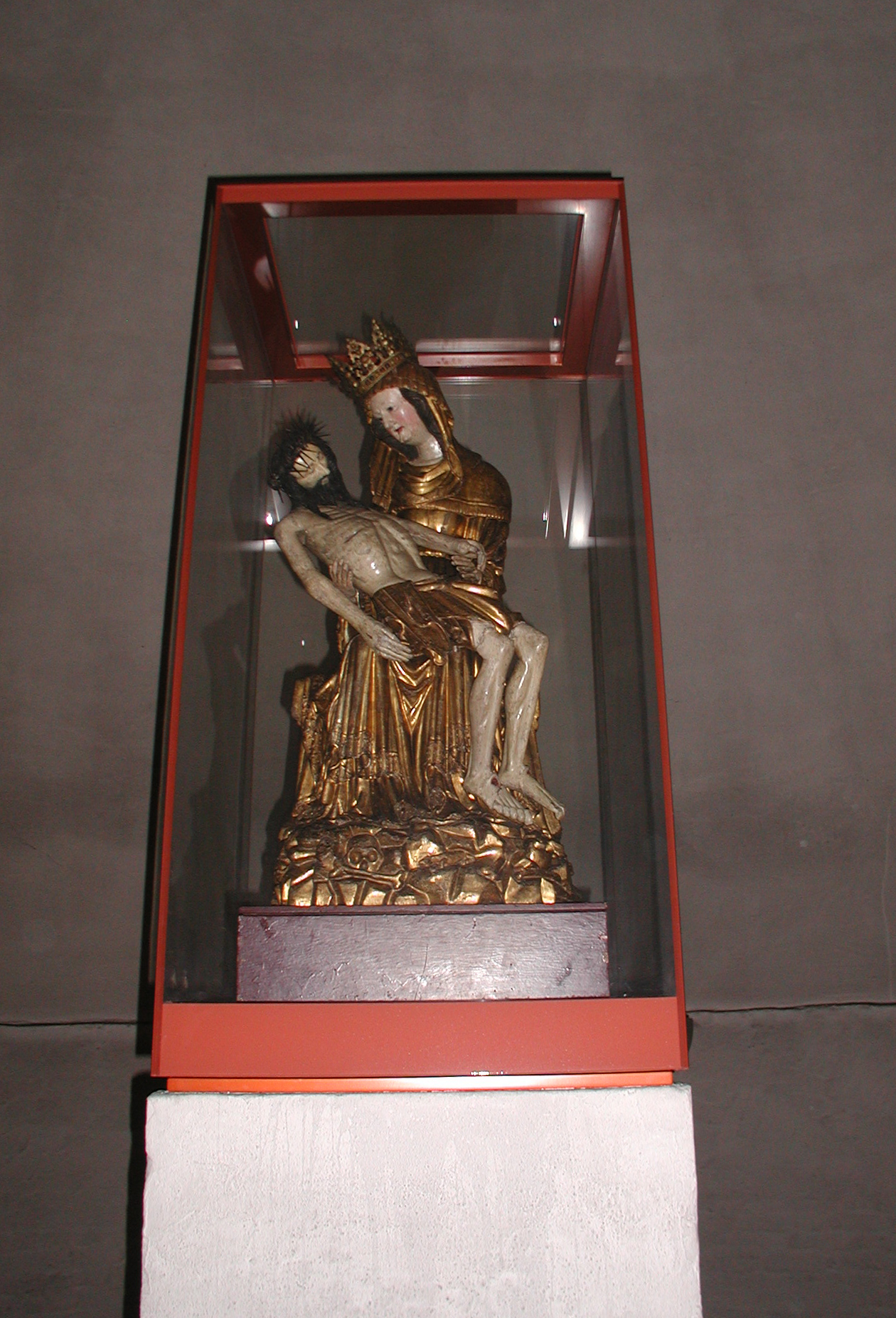 Köln, Kalker-Kapelle